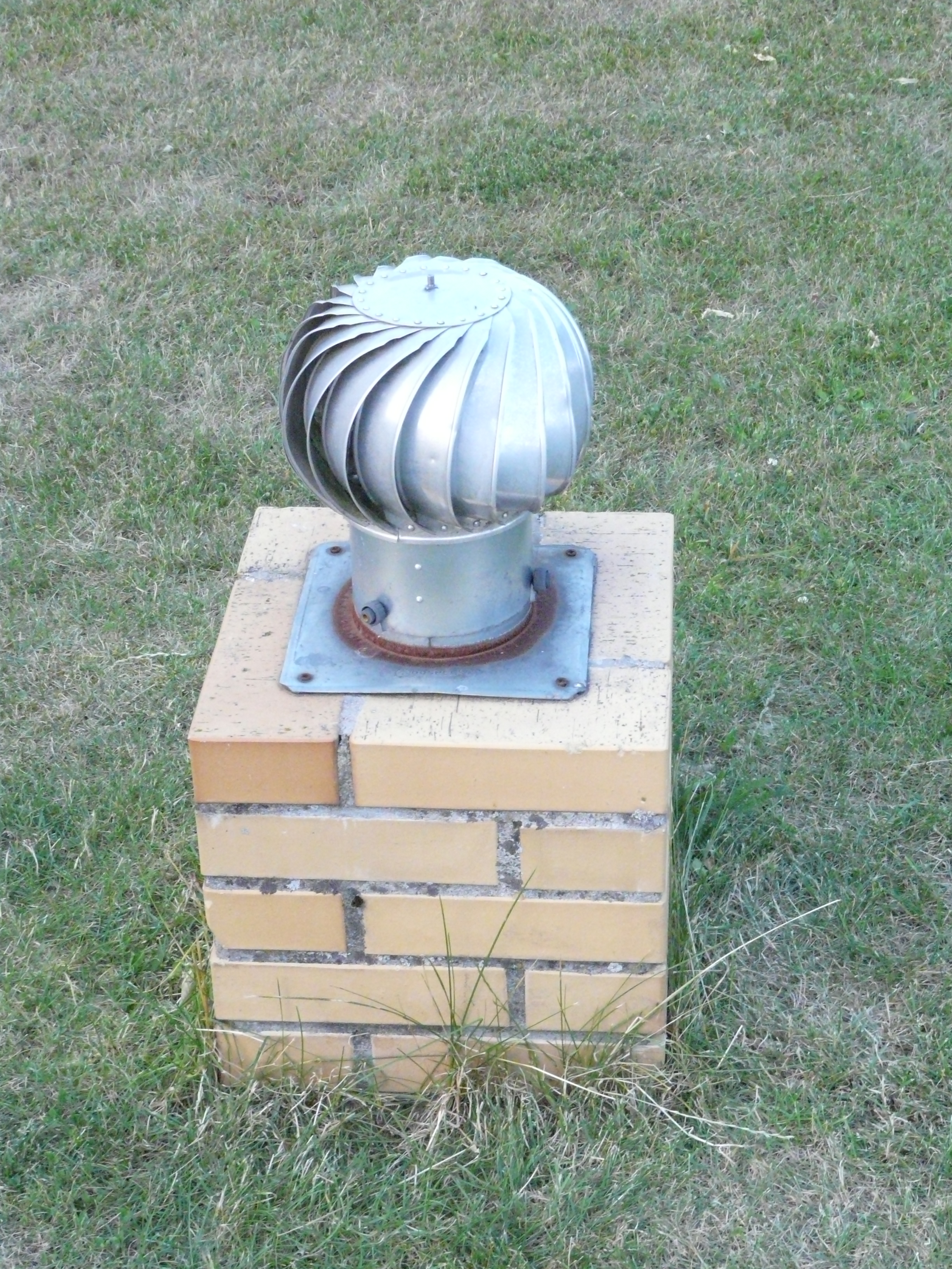 ventilation fan